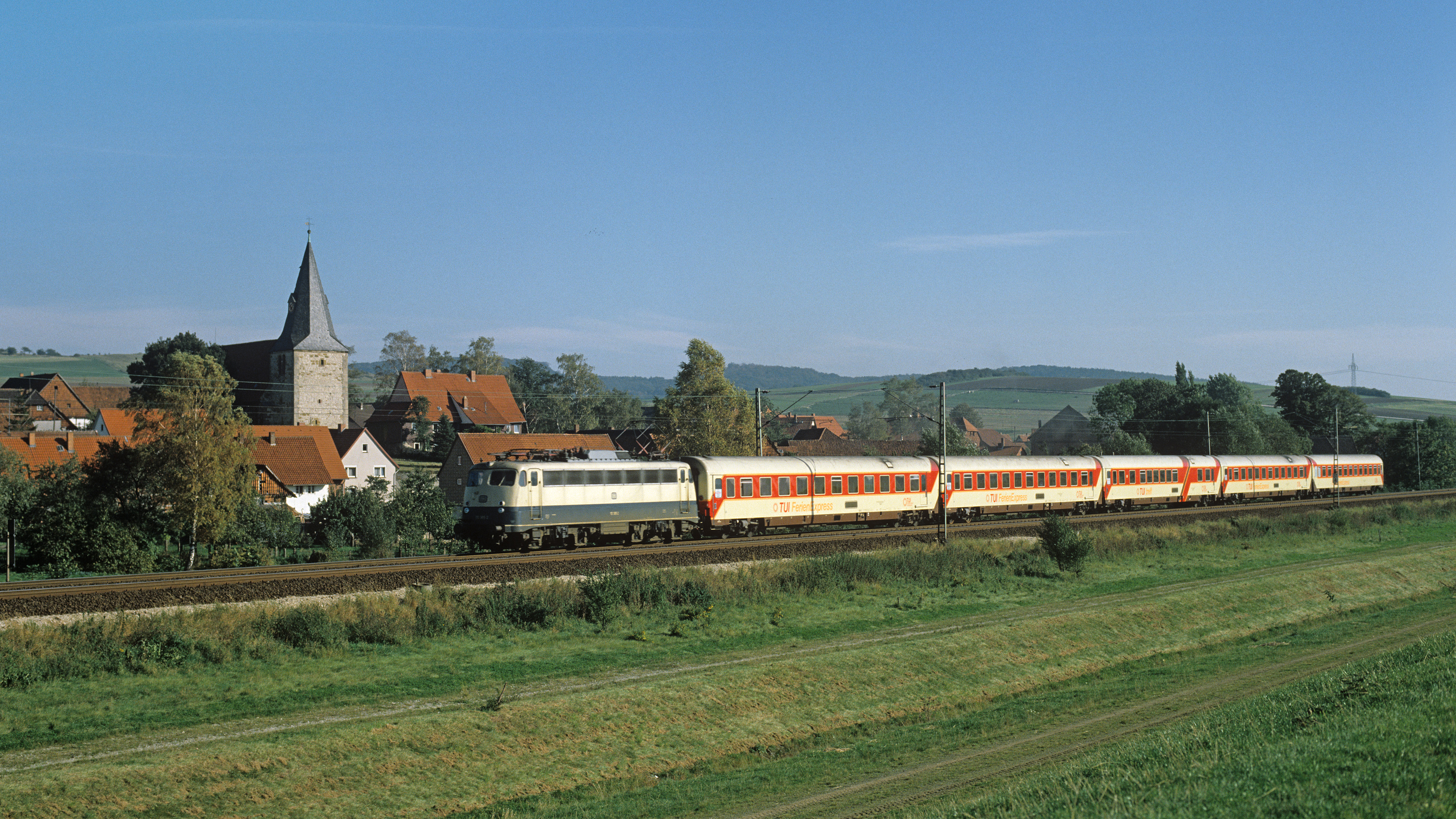 TUI-Ferien-Express D 27444 Siofok - Hamburg auf der Nord-Süd-Strecke zwischen Northeim und Kreiensen bei Hohnstedt, Zuglok ist 110 396-9, Aufnahme vom 17.10.1984